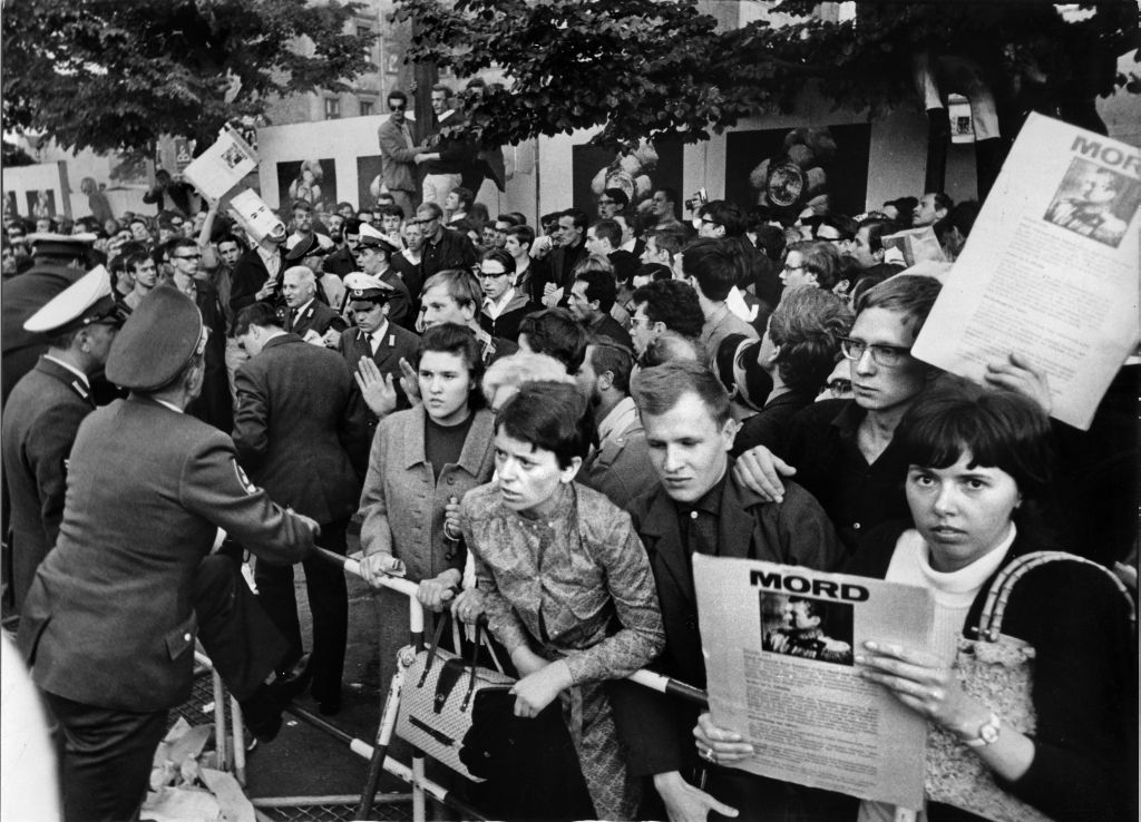 Ludwig Binder: Studentenrevolte 1967/68, West-Berlin; veröffentlicht vom Haus der Geschichte der Bundesrepublik Deutschland